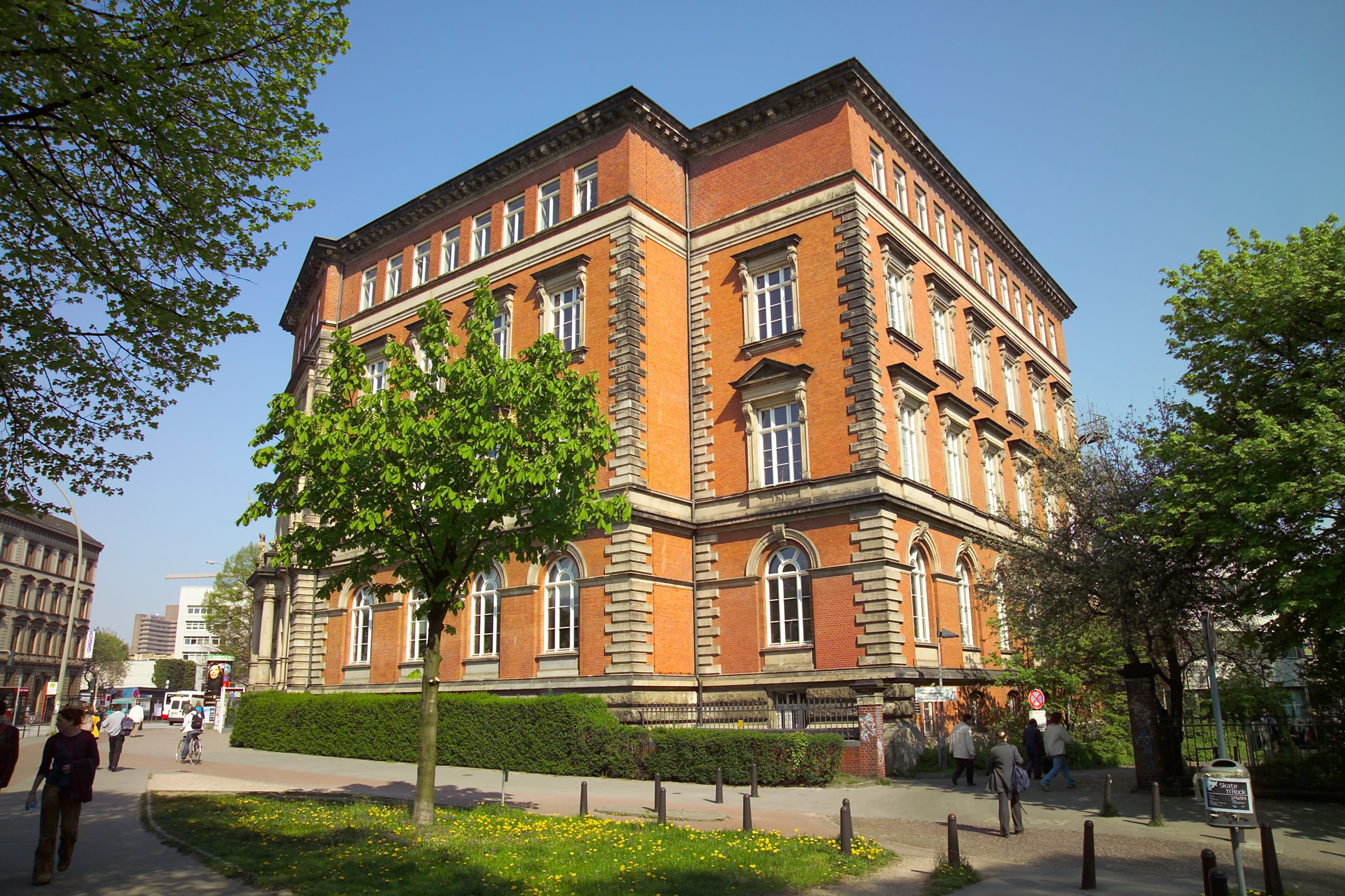 Fassade der Staats- und Universitätsbibliothek Hamburg (Altbau), ehemalige Wilhelmgymnasium.